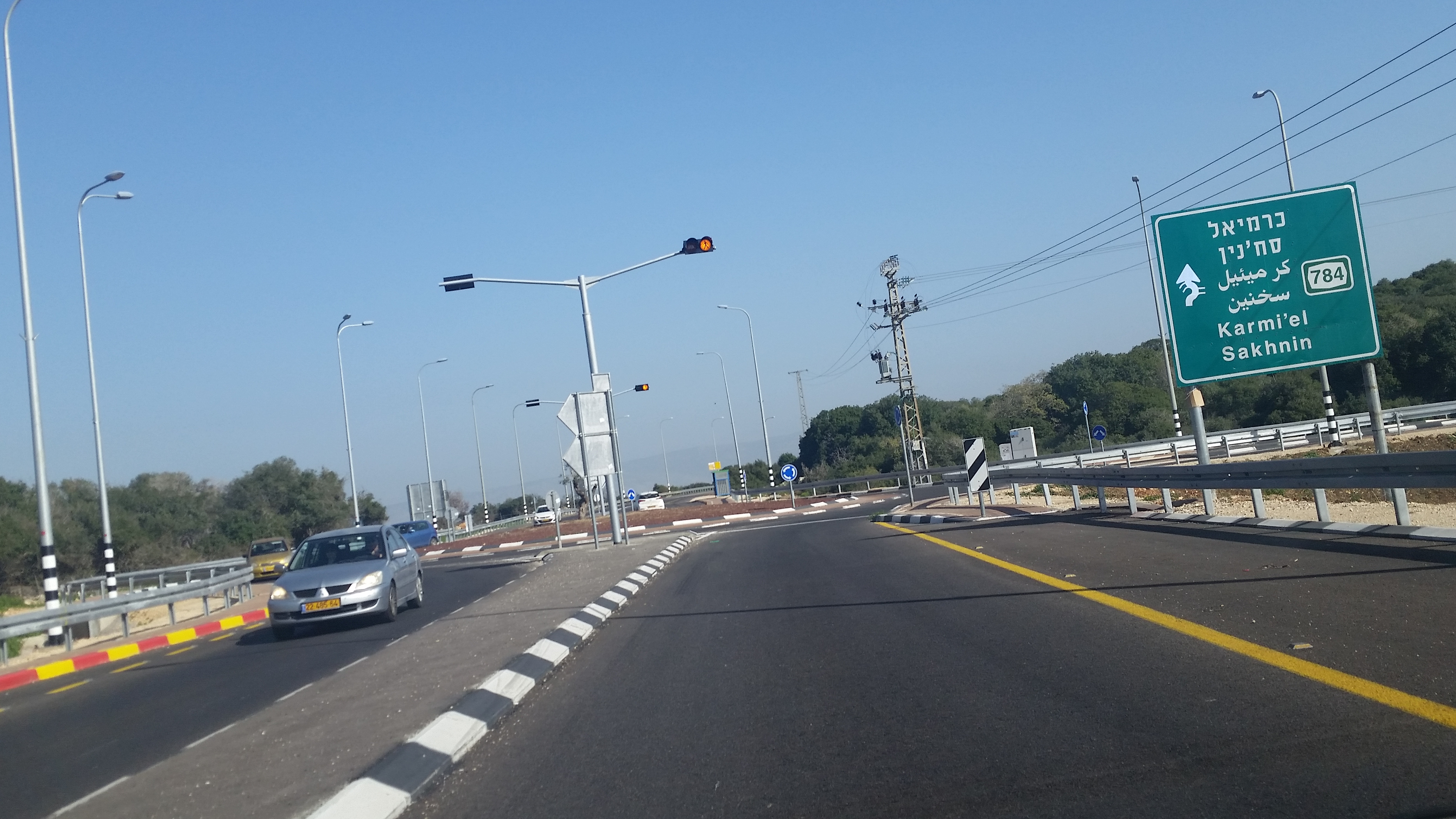 צומת יודפת מבט מכיוון צומת מורשת